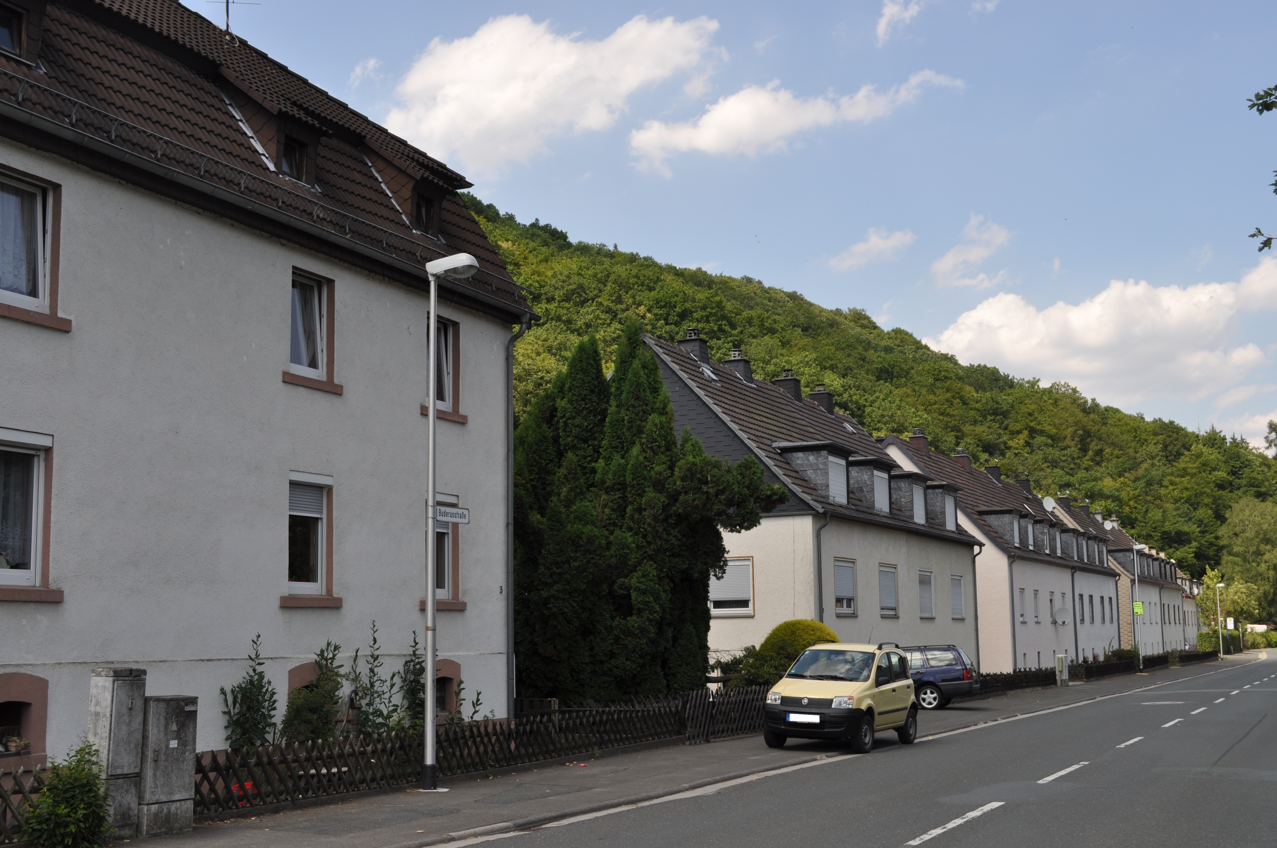 Audenschmiede, Teil von Weilmünster, Buderusstraße (Weiltalstraße)